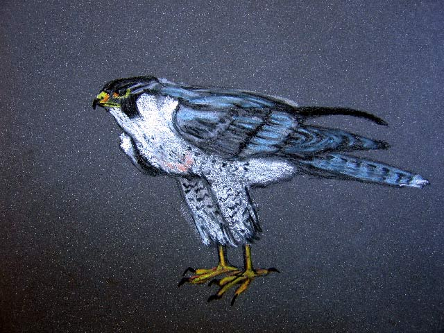 аутор Снежана Трифуновић Цртано пастелним оловкама и кредама (сувим, меким) на тамном пастел папиру. Цртежи фотографисани Canon - om S60. Фотографије обрађене у Photoshop-u.